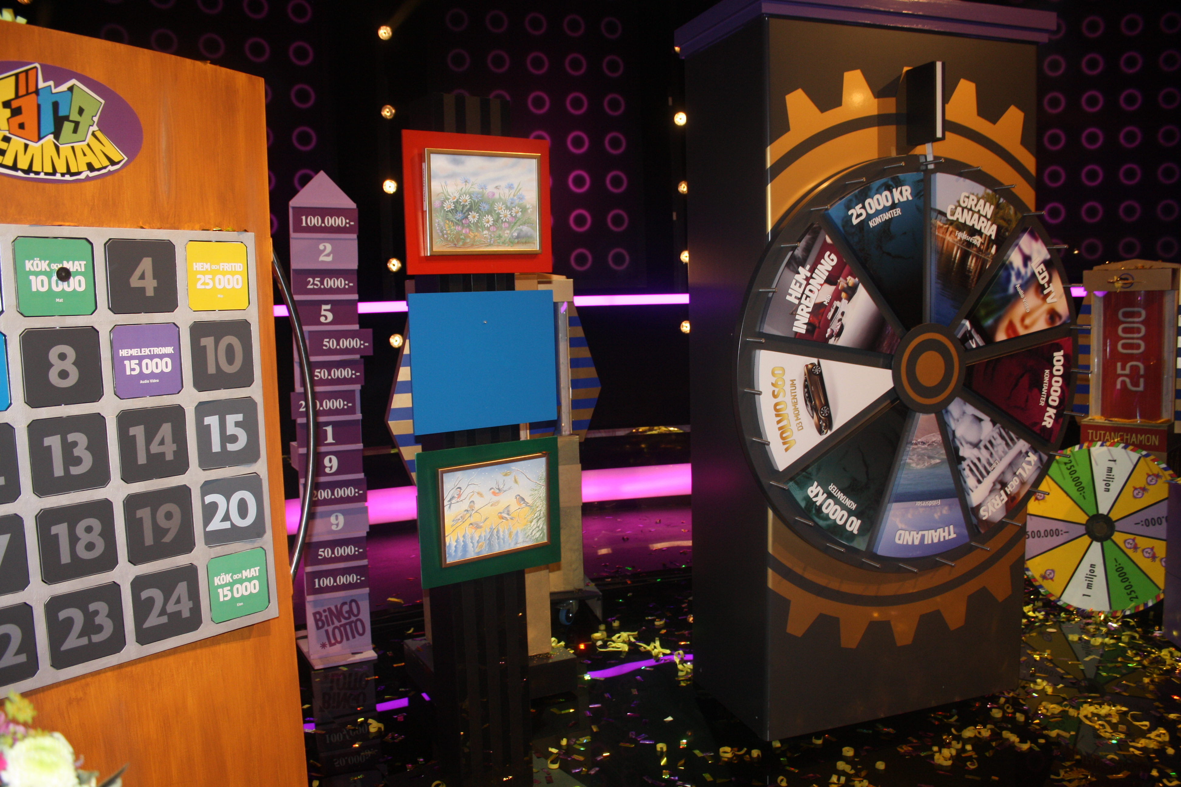 Spel på Bingolottos tjugoårsjubileum